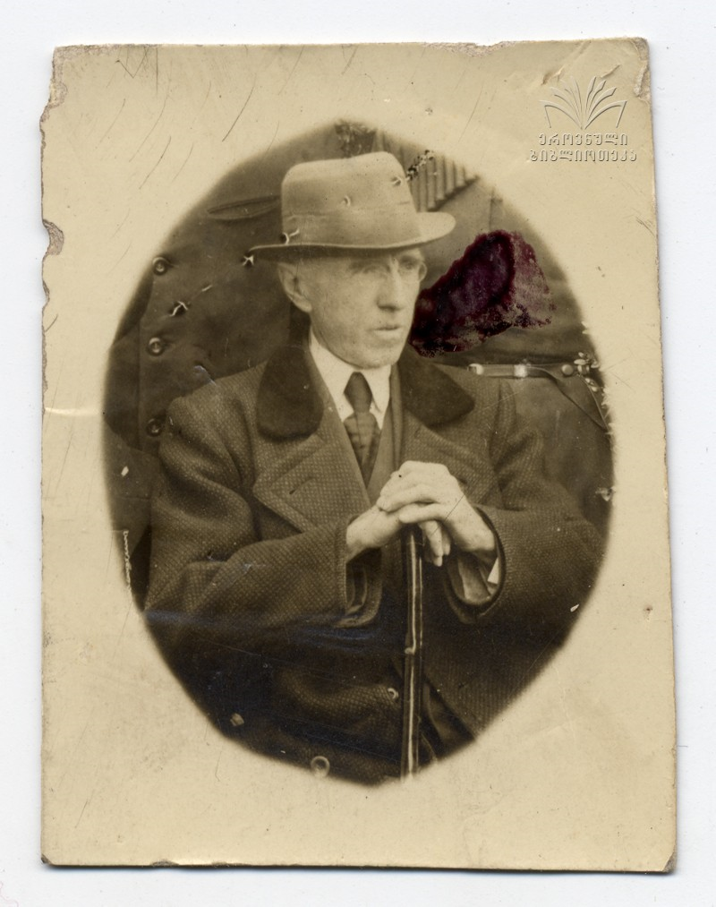 დიმიტრი კონსტანტინეს ძე ერისთავი